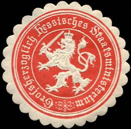 Sealing stamp Title: Gr. Hessisches Staatsministerium Description: rot, weiss, geprägt Place: Darmstadt size: 4 cm